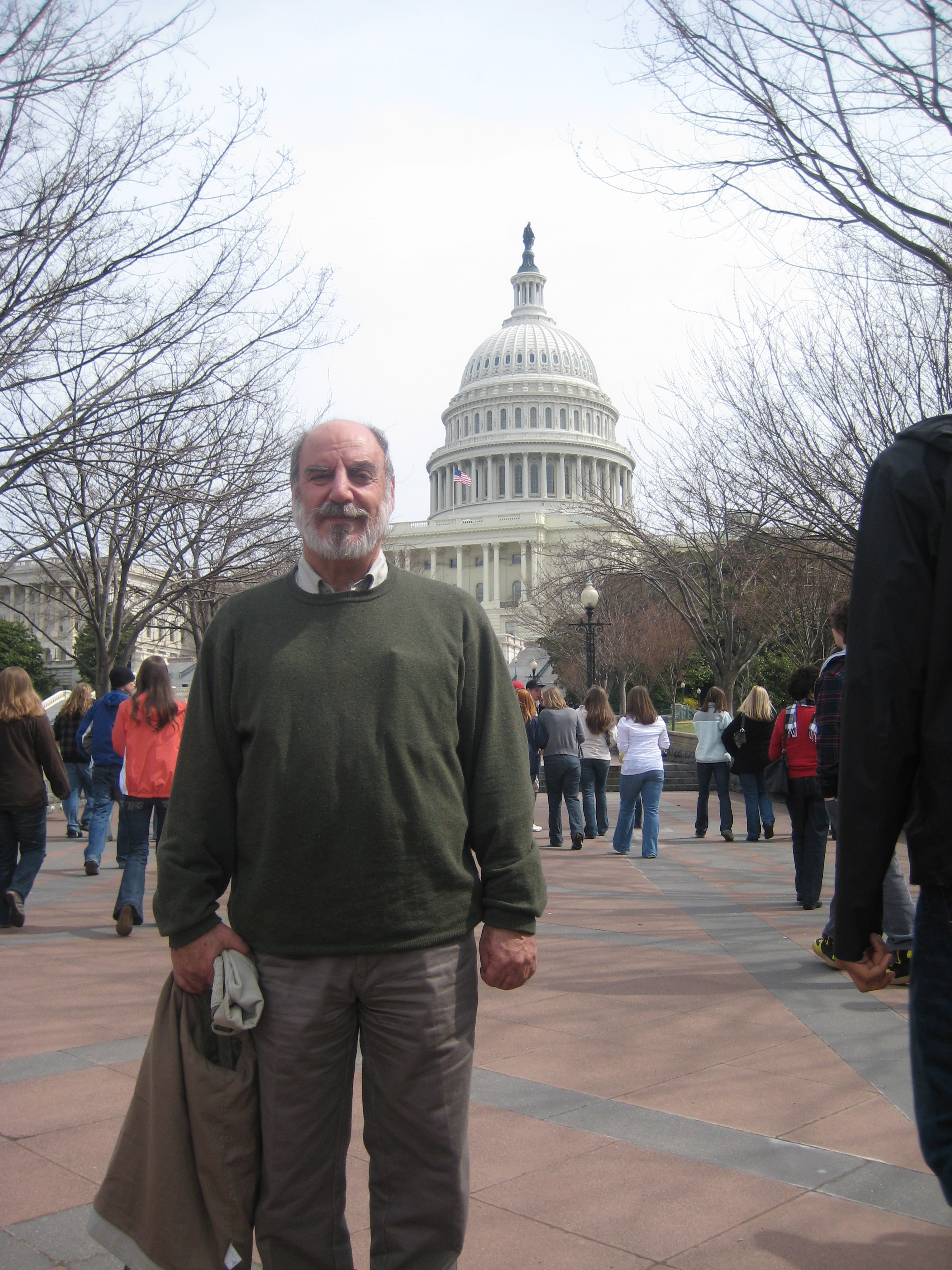 Kurdî: Tosinê Reşîd li Washingtonê/2008